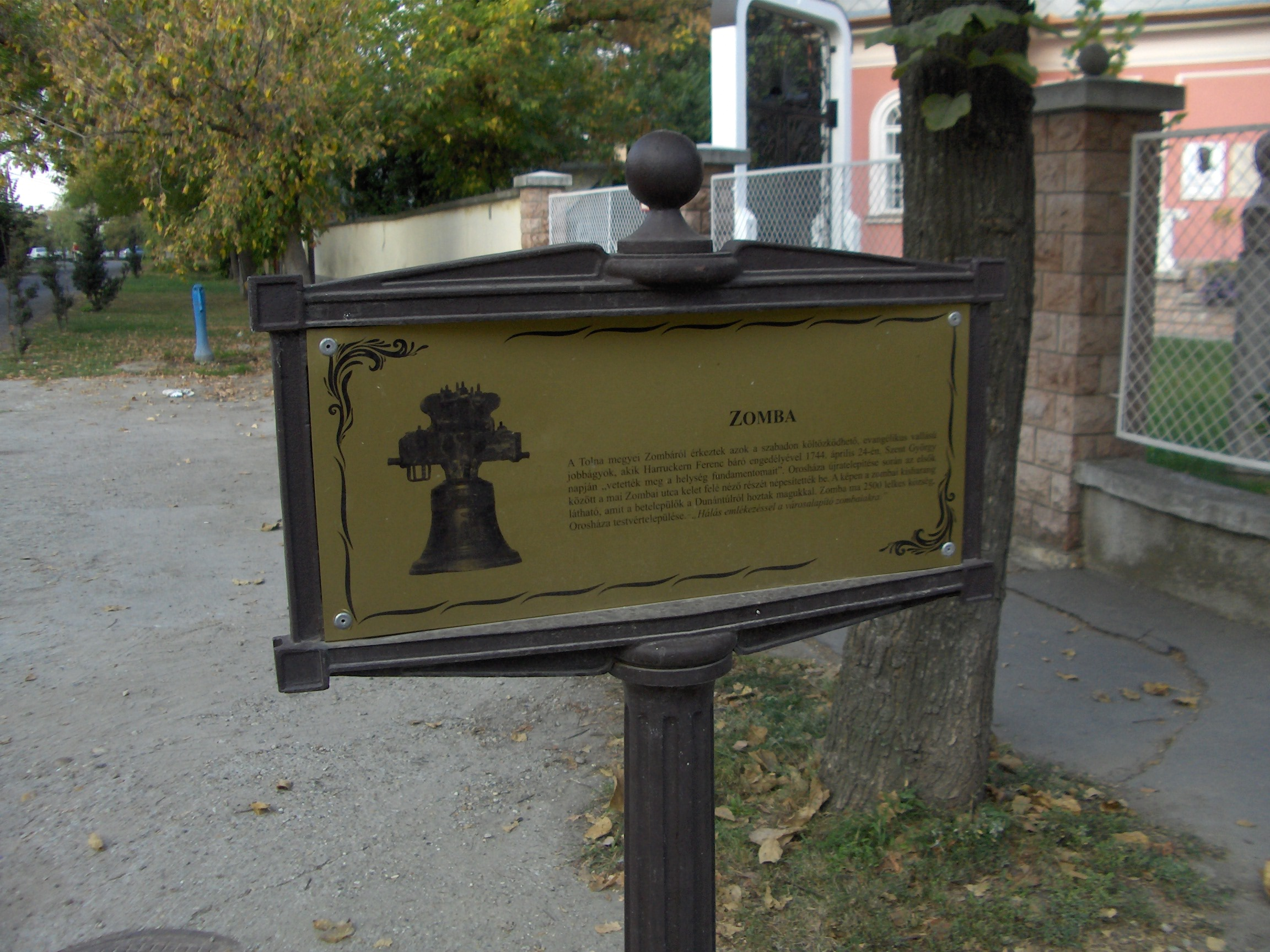 Orosháza, Zomba-tábla